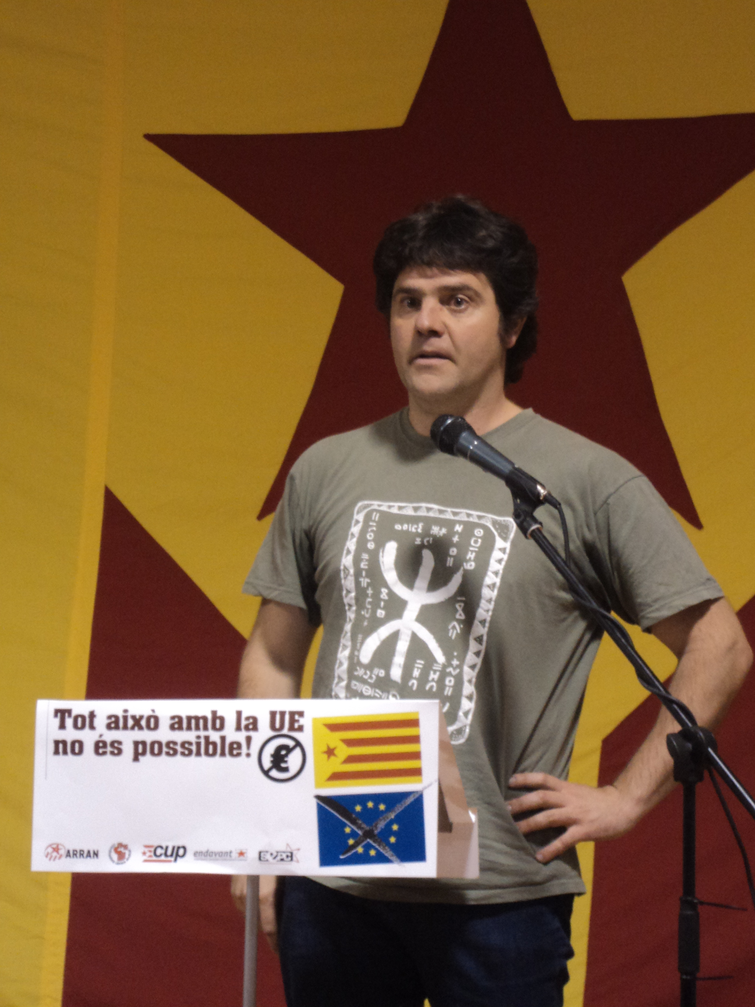 L'economista i pastisser Josep Manel Busqueta exposant el seu discurs contra la Unió Europea i les seves eleccions, a l'acte organitzat el 22 de maig de 2014 al barri de Sant Andreu de Palomar de Barcelona, dins de la campanya "Amb la UE no tenim futur!".